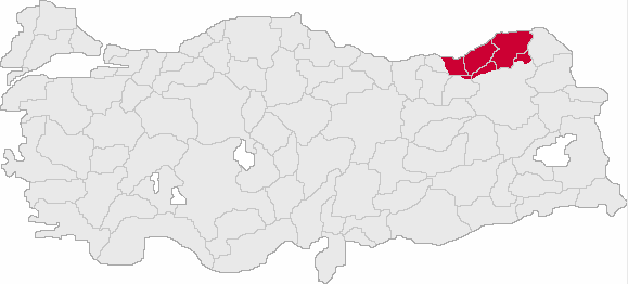 Das Siedlungsgebiet der Lasen im Nordosten der Türkei